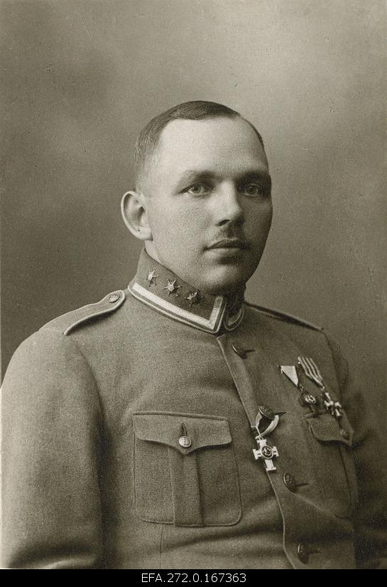 Kaitseliidu Tartumaa Maleva pealik kolonelleitnant Jaan Unt 1925. aastal